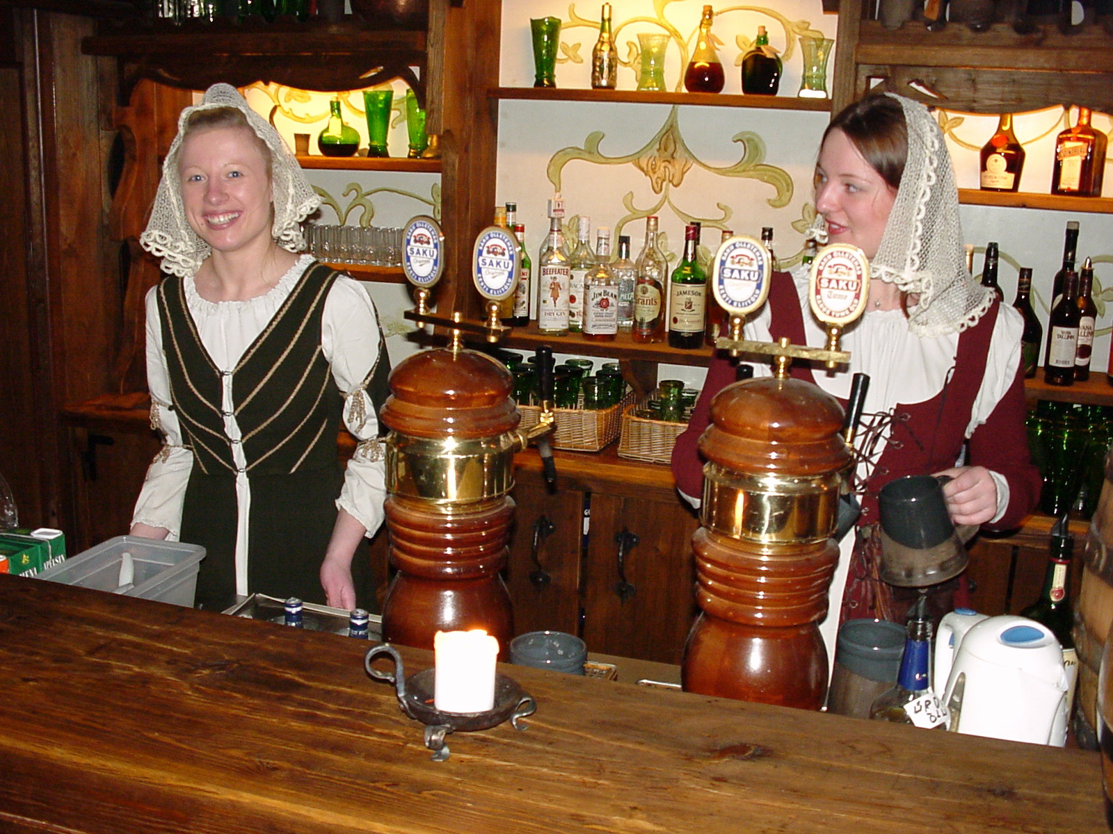 Trachten in Tallinn